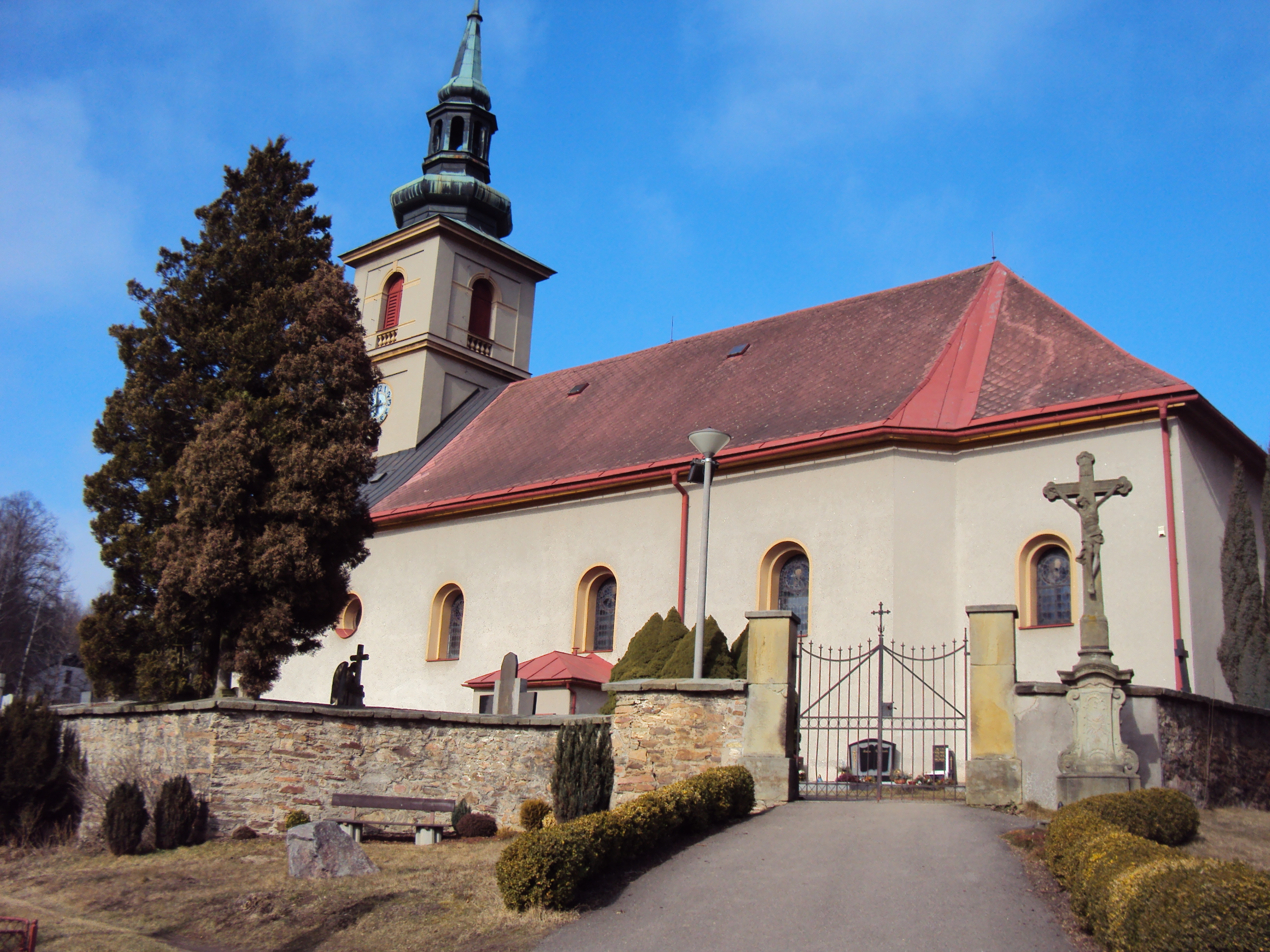 Kostel Bystřec 01